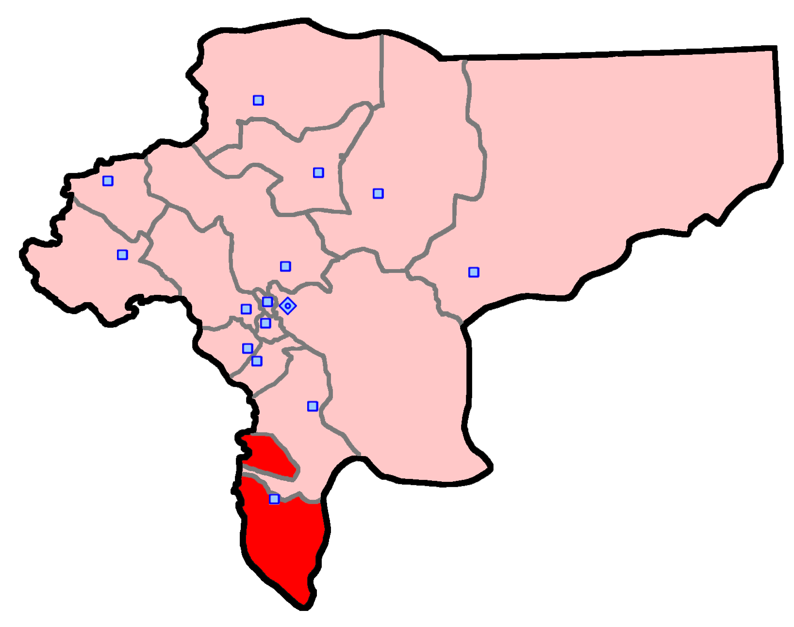 حوزهٔ انتخاباتی سمیرم برای انتخابات مجلس شورای اسلامی